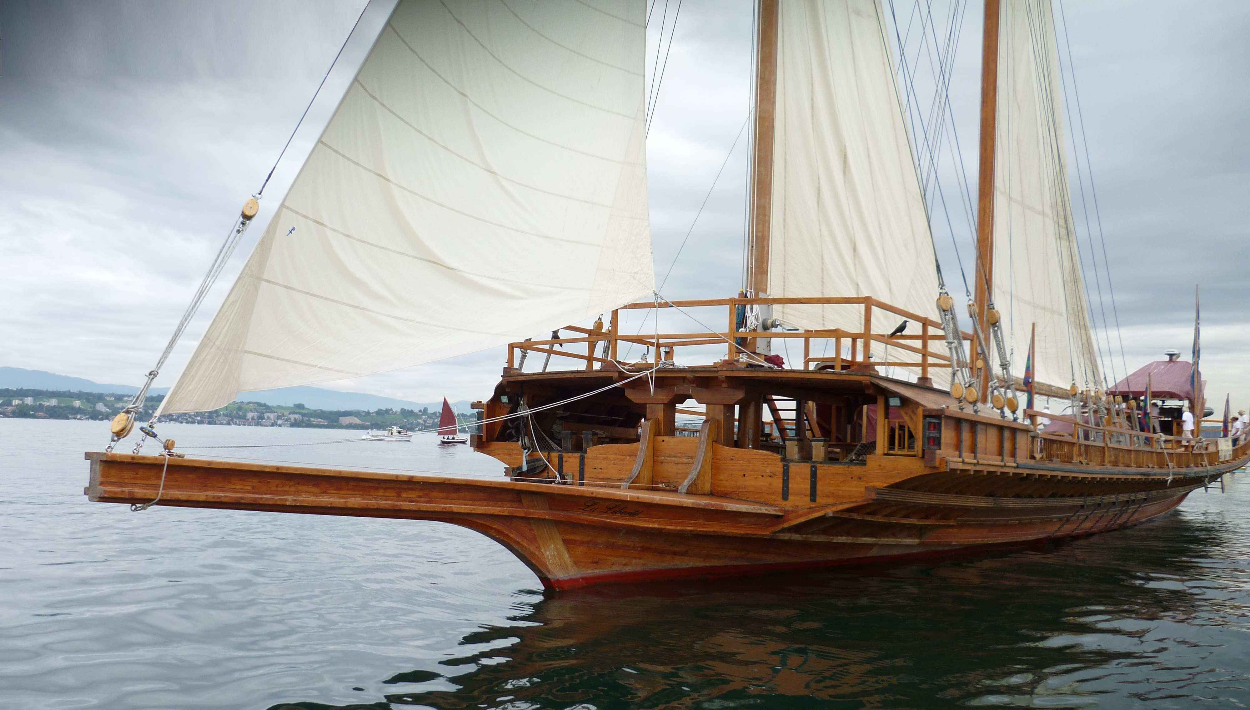 Galère "La Liberté", basée à Morges (Léman, Suisse), réplique d'une galère du XVII° siècle